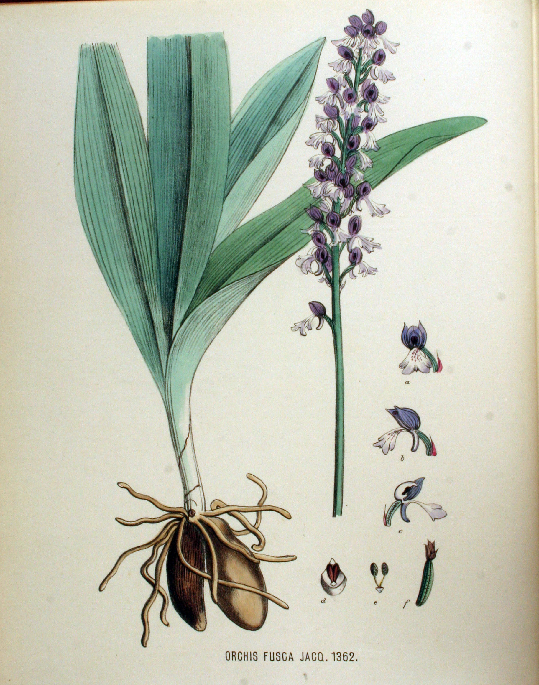 Orchis purpurea Huds. (Syn. Orchis fusca Jacq.